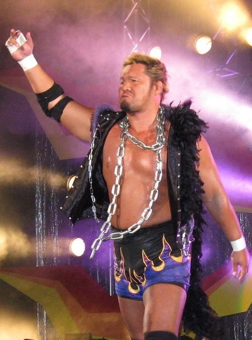 2008年8月15日 大阪大会 「G1CLIMAX」 真壁刀義